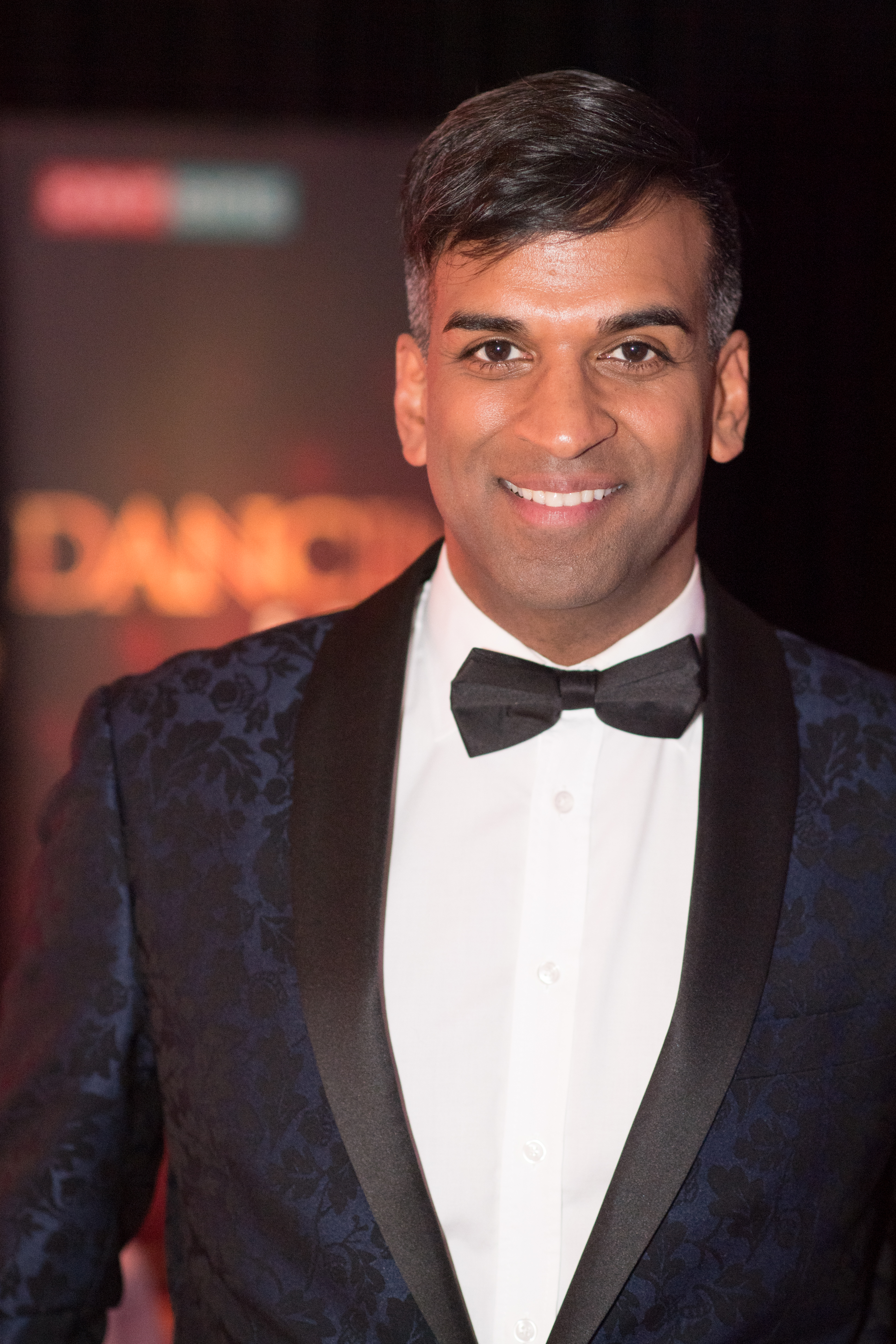 Wien, 15. März 2019: ORF Dancing Stars, 1. Folge - Bild zeigt Ramesh Nair.